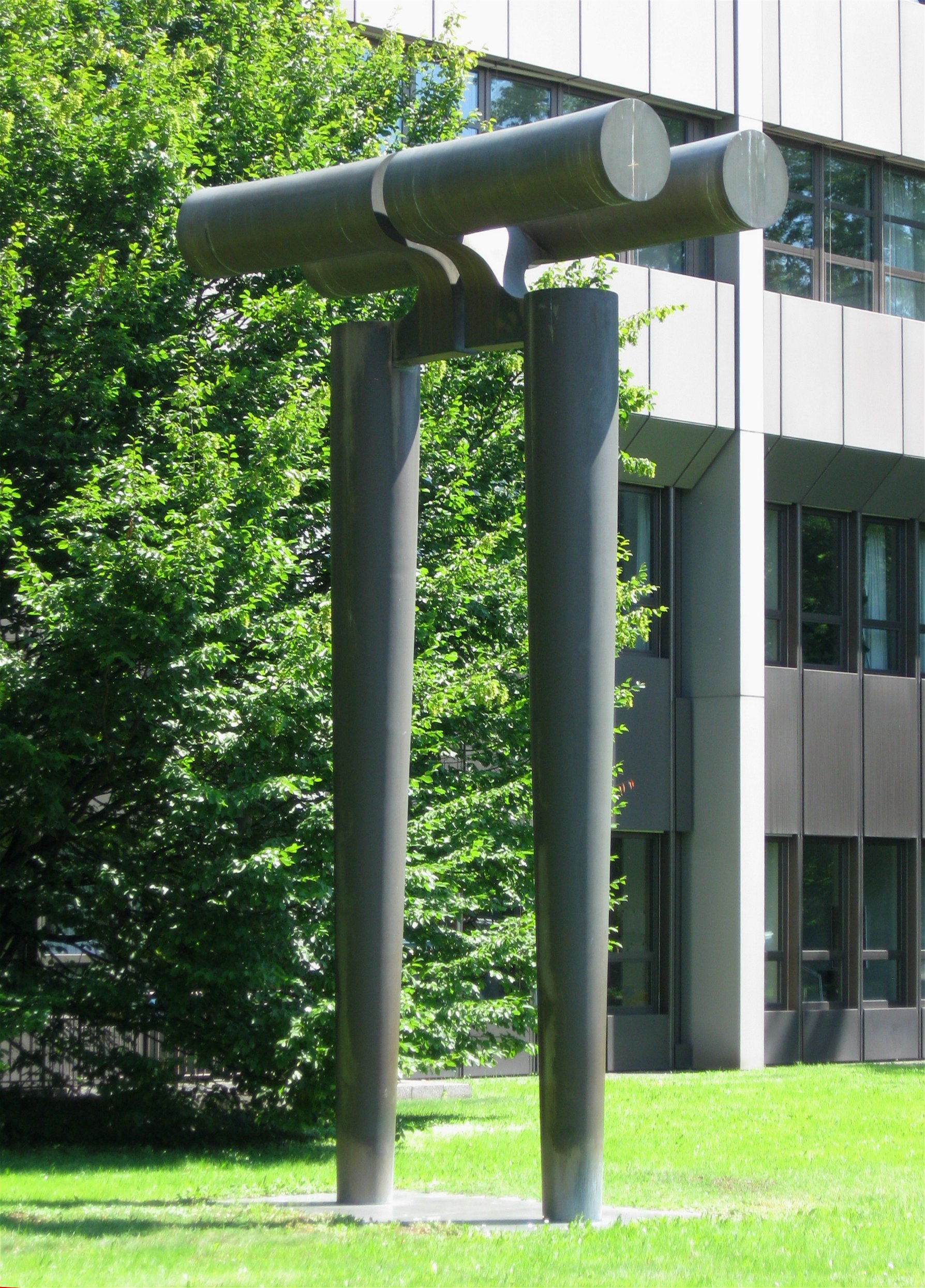 Fritz Koenig: Große Torfigur, Bronze, 1985/86, Tucherpark, München